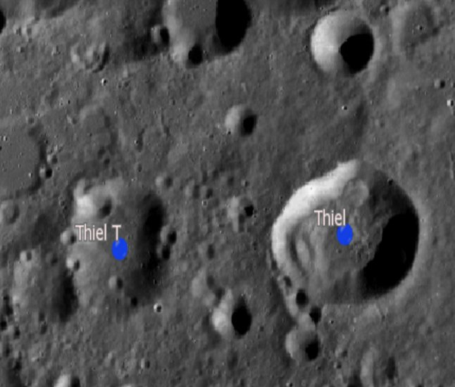 Cráter lunar Thiel. Cráteres satélite. (Imagen LRO)